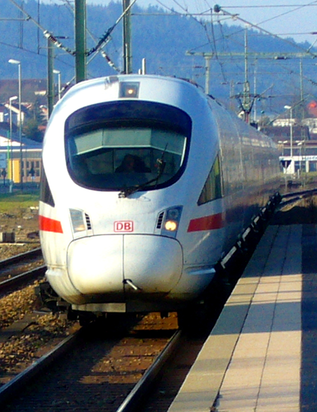 InterCityExpress (Baureihe 411, ICE-T) im Bahnhof Tuttlingen